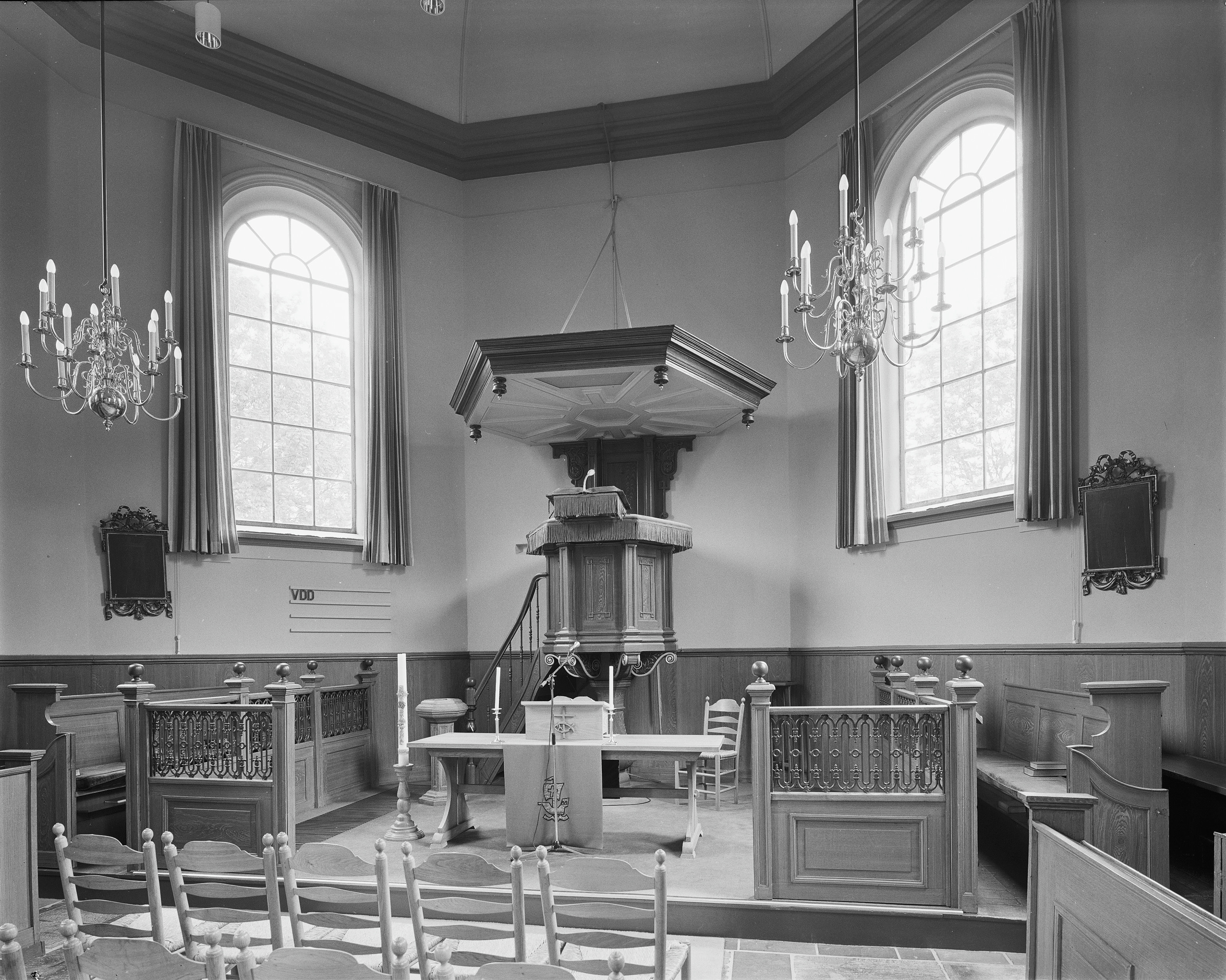 Nederlands Hervormde Kerk: INTERIEUR, PREEKSTOEL